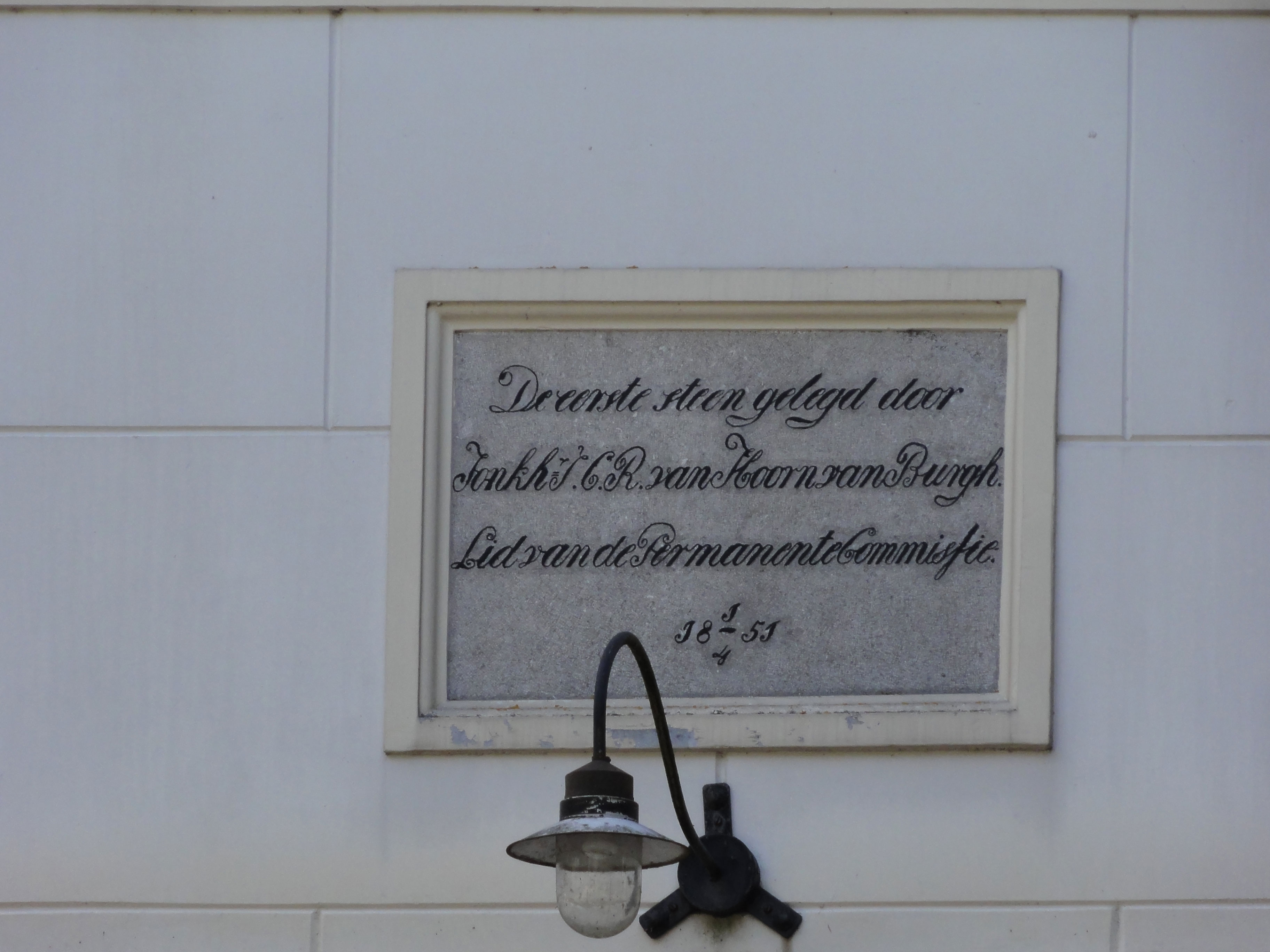 Eerste steen hervormde kerk van Wilhelminaoord - Maatschappij van Weldadigheid - Koningin Wilhelminalaan 53 Wilhelminaoord - rijksmonument